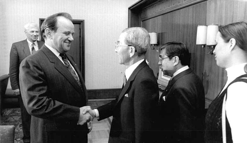 ADN-ZB Oberst 30.5.87 Berlin: Jubiläum - Bürgermeister. Die Delegationen von Hiroshima unter Leitung von Bürgermeister Takeshi Araki (M.) und Nagasaki unter Leitung von Bürgermeister Hitoshi Motoshima (r.) wurden vom Berliner Oberbürgermeister Erhard Krack (l.) herzlich willkommen geheißen. Sie weilen anläßlich des internationalen Treffen der Bürgermeister zum 750jährigen Jubiläum Berlins in der DDR-Hauptstadt.